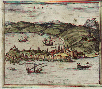 Ceuta